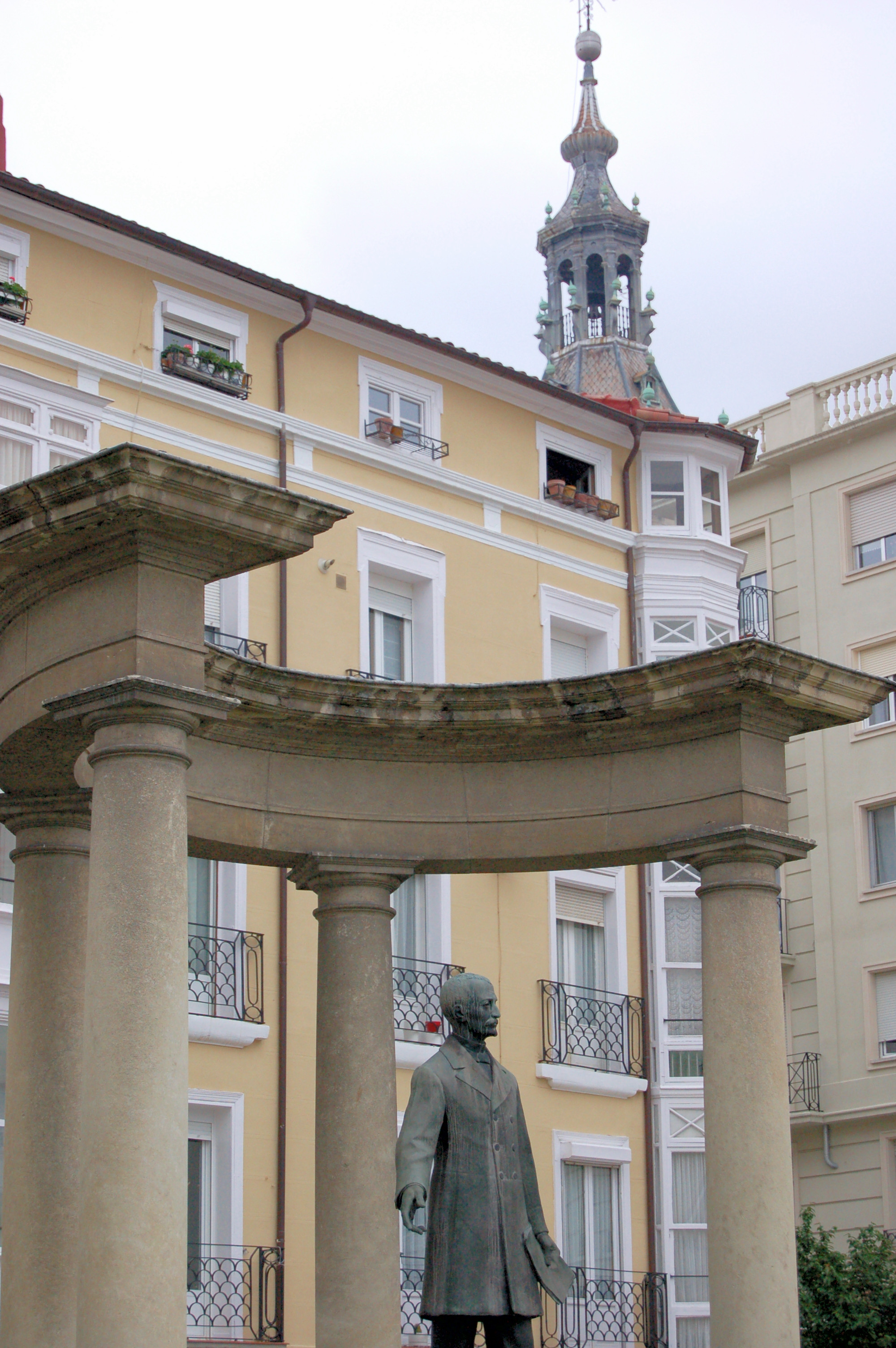 Mateo Moraza politikari gasteiztarraren estatua